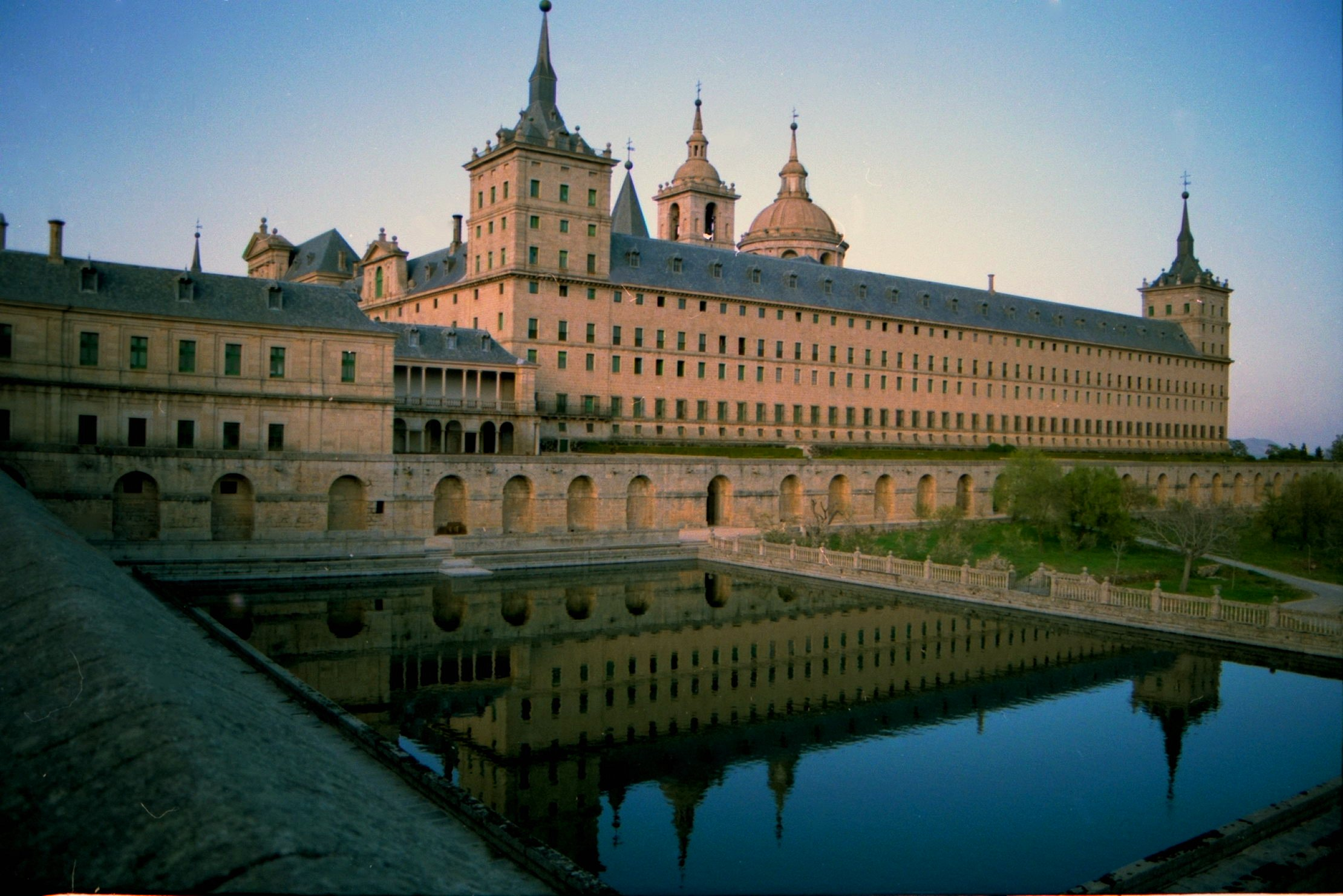 Monastery of San Lorenzo de El Escorial, Spain.